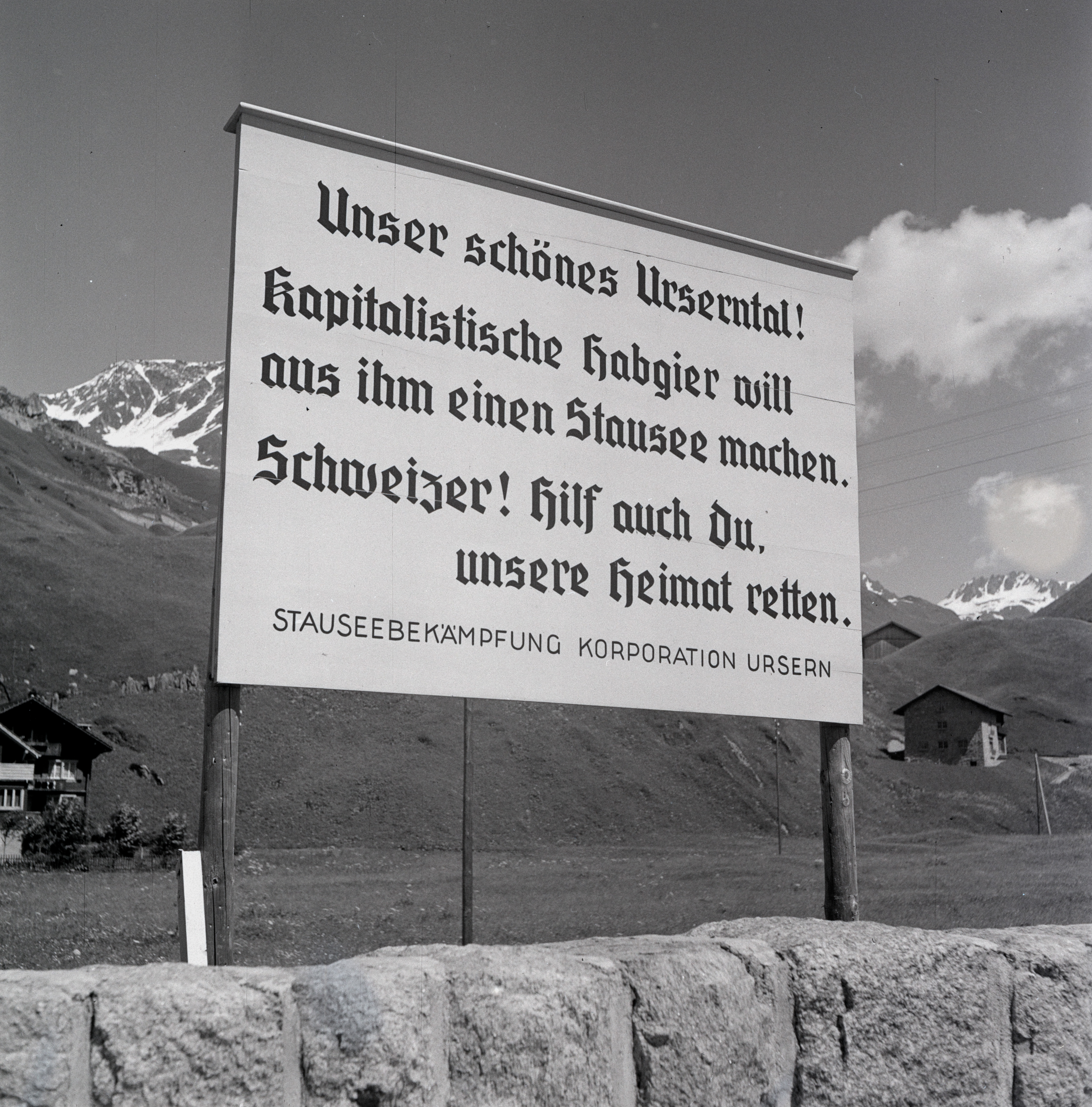 Protestschild gegen das Projekt von Urseren, um 1945-1946.